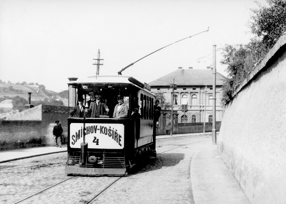 Hlaváčkova tramvaj u Klamovky v červnu 1897.